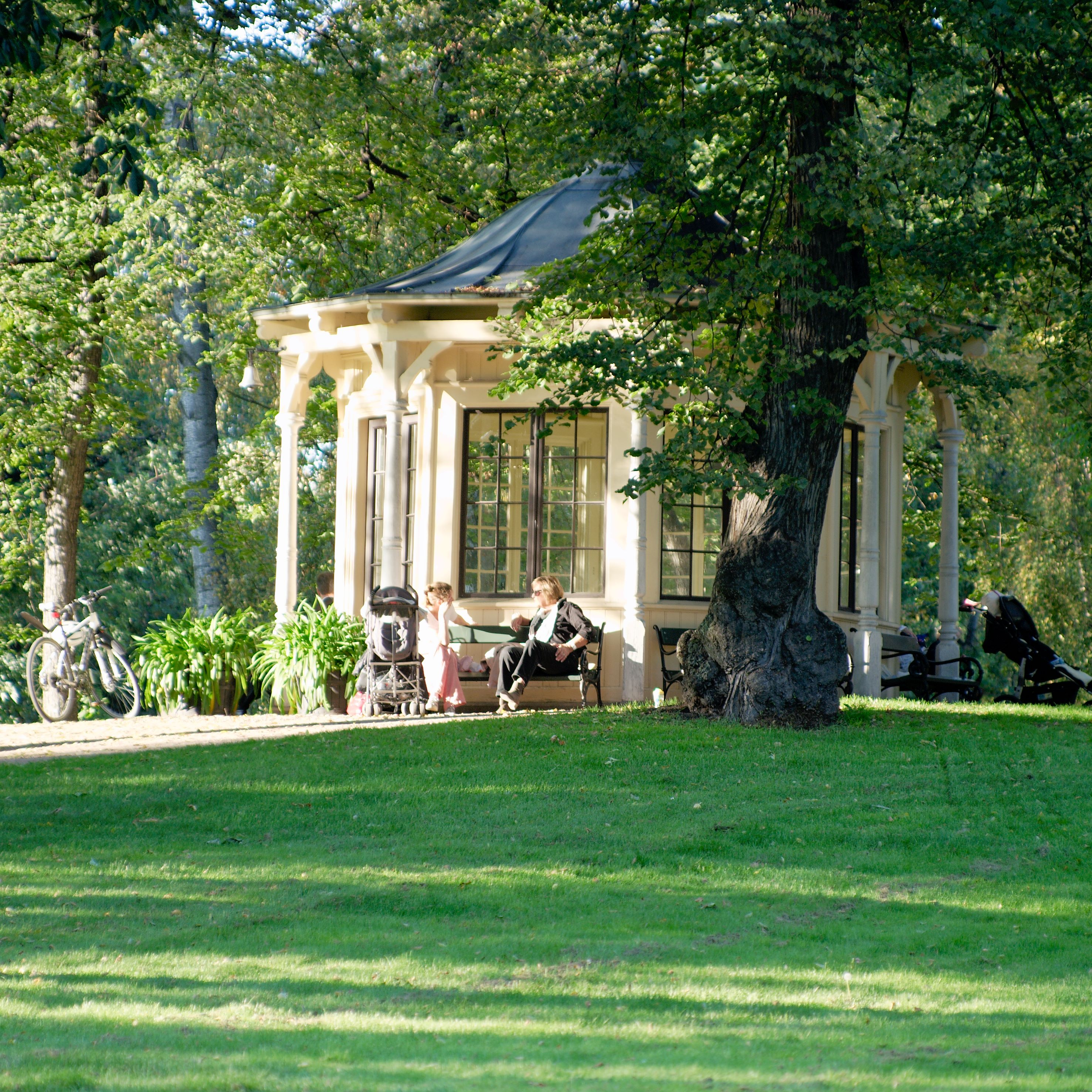 Dronningparken.